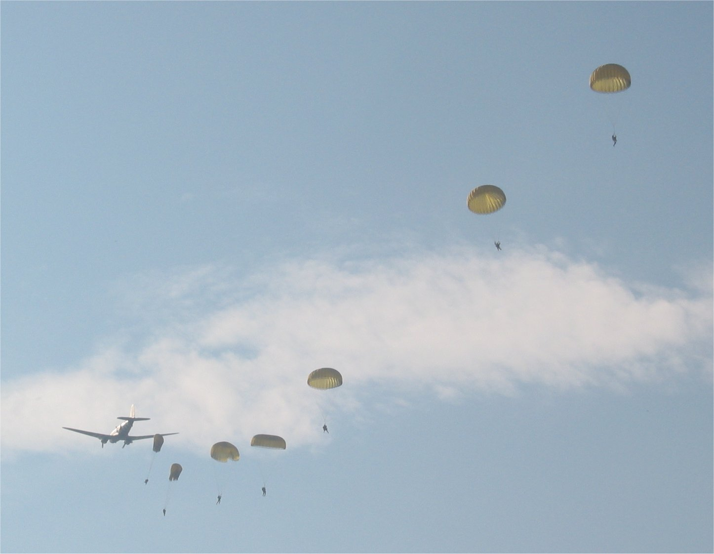 Dakota parachutisten dropping